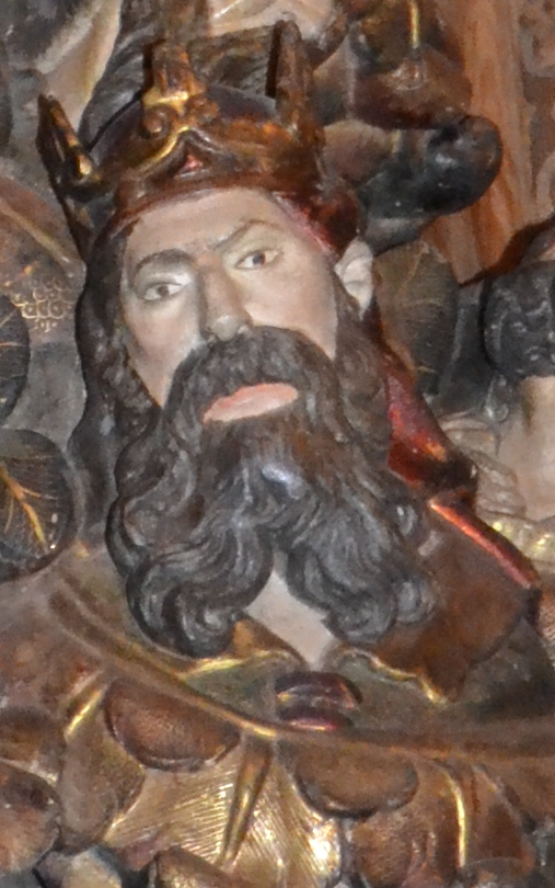 Busto del Rey David del retablo de la Purísima de Santa María de Verdú.